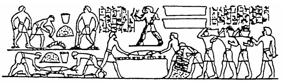 MÖ mısır yazıtlarında döküm işleminin figüre edilmesi.